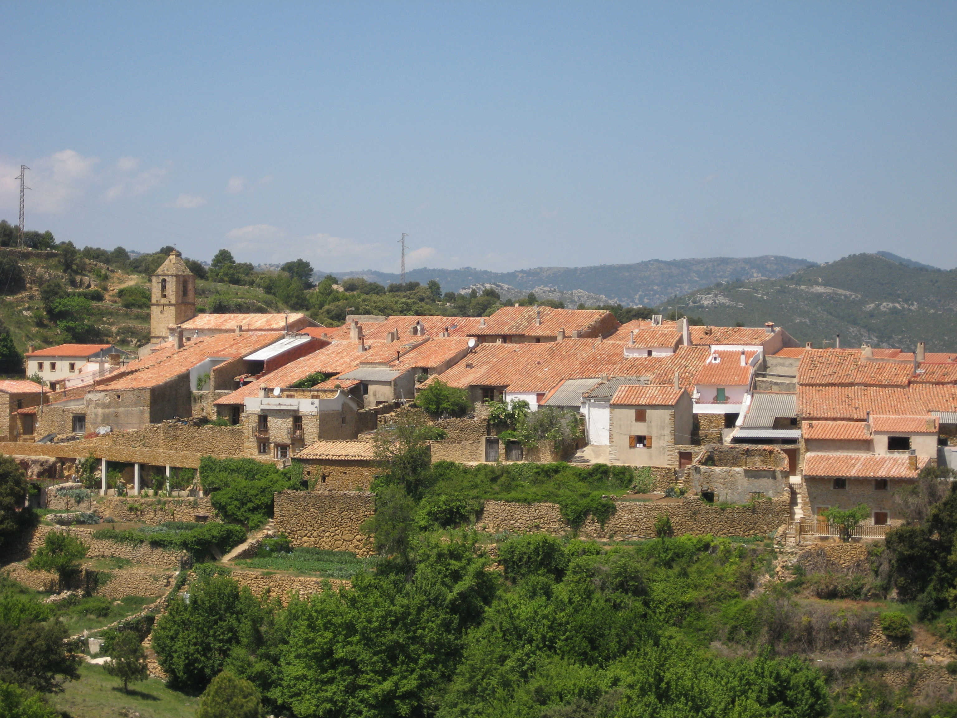 Bel, poble de Rossell (Baix Maestrat)